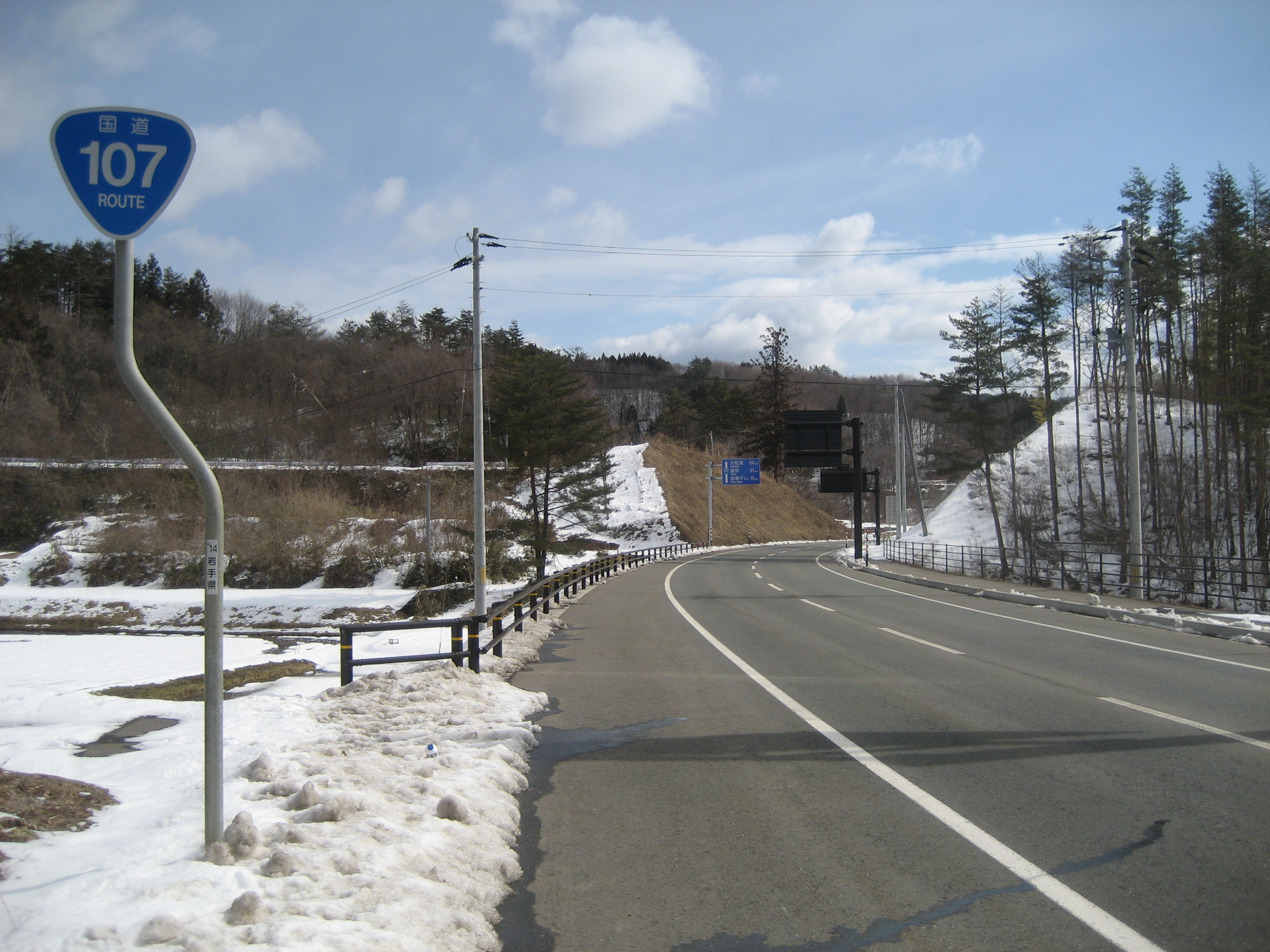 国道106号線岩手県奥州市江刺田瀬IC付近